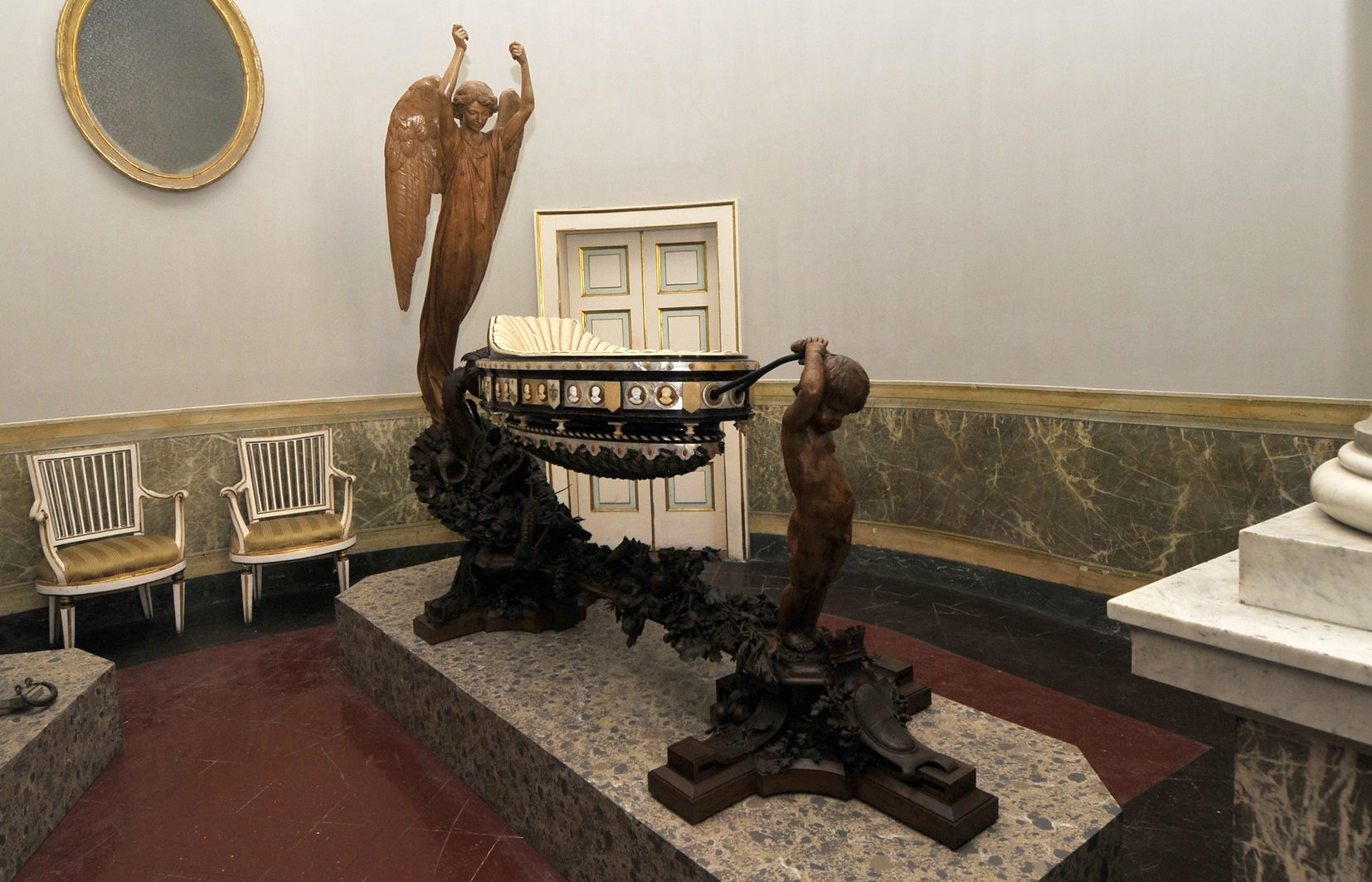 Culla di Vittorio Emanuele III, Domenico Morelli, Reggia di Caserta